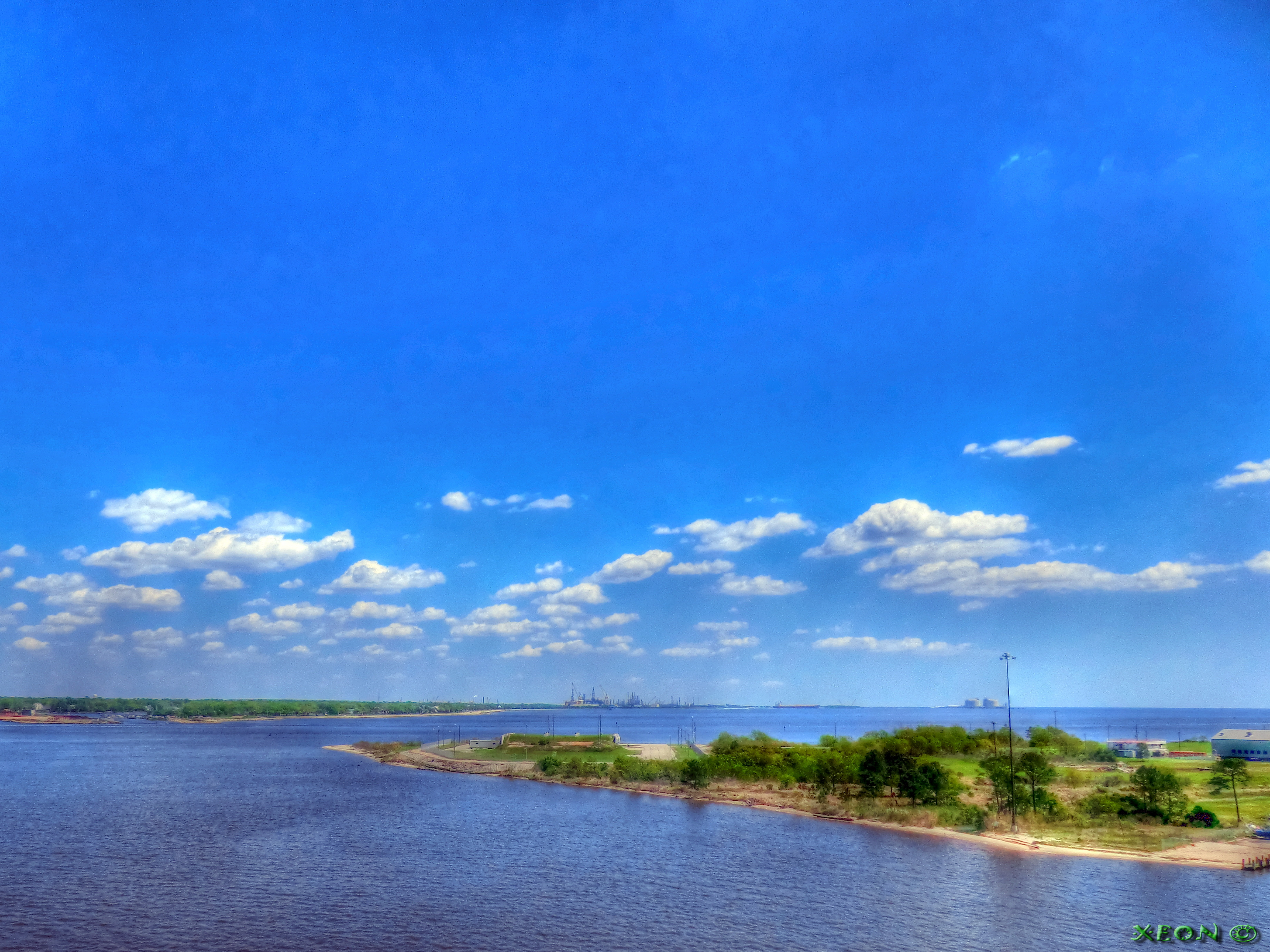 Mississippi Sound